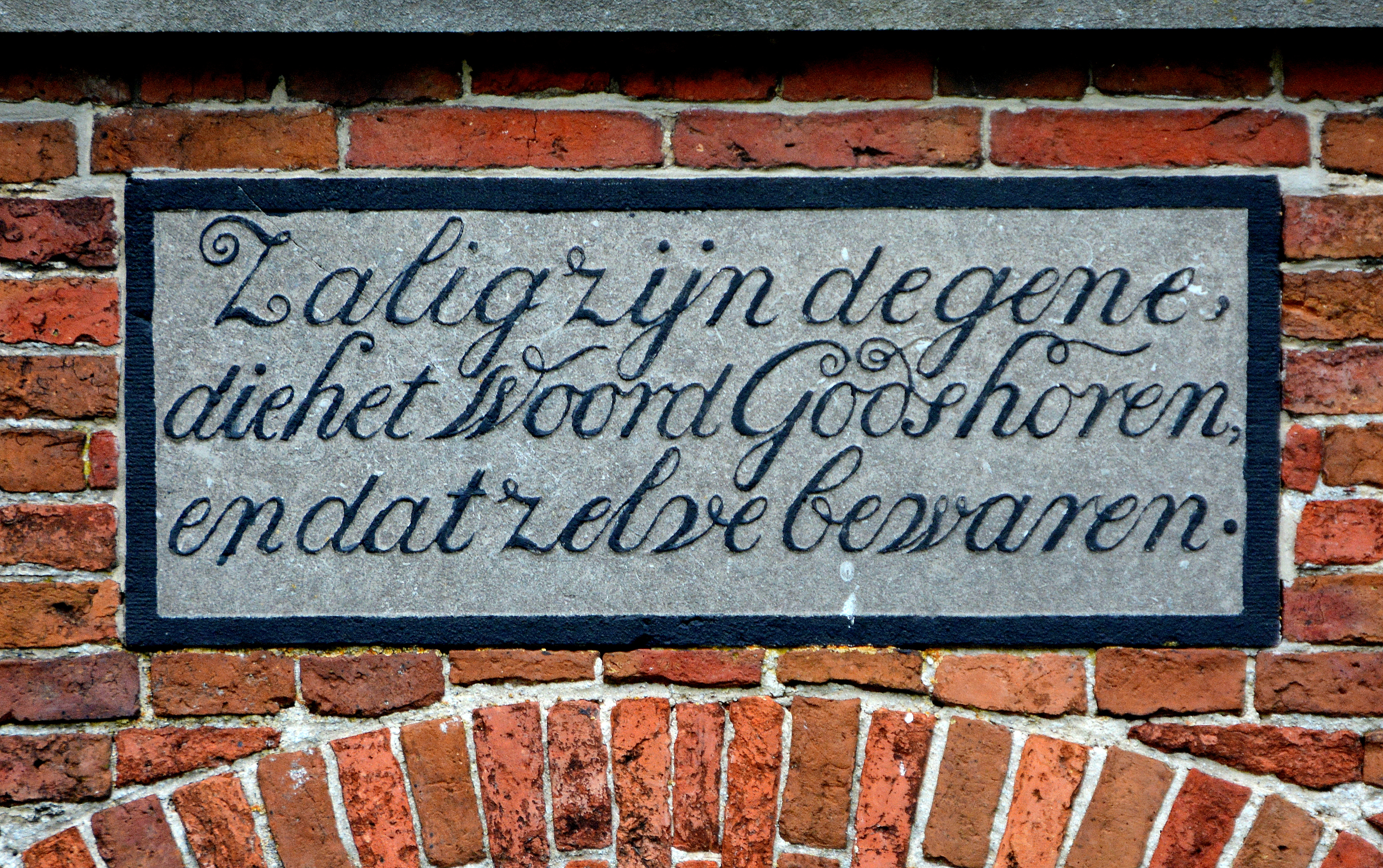 Laurentiuskerk, Raerd, gevelsteen